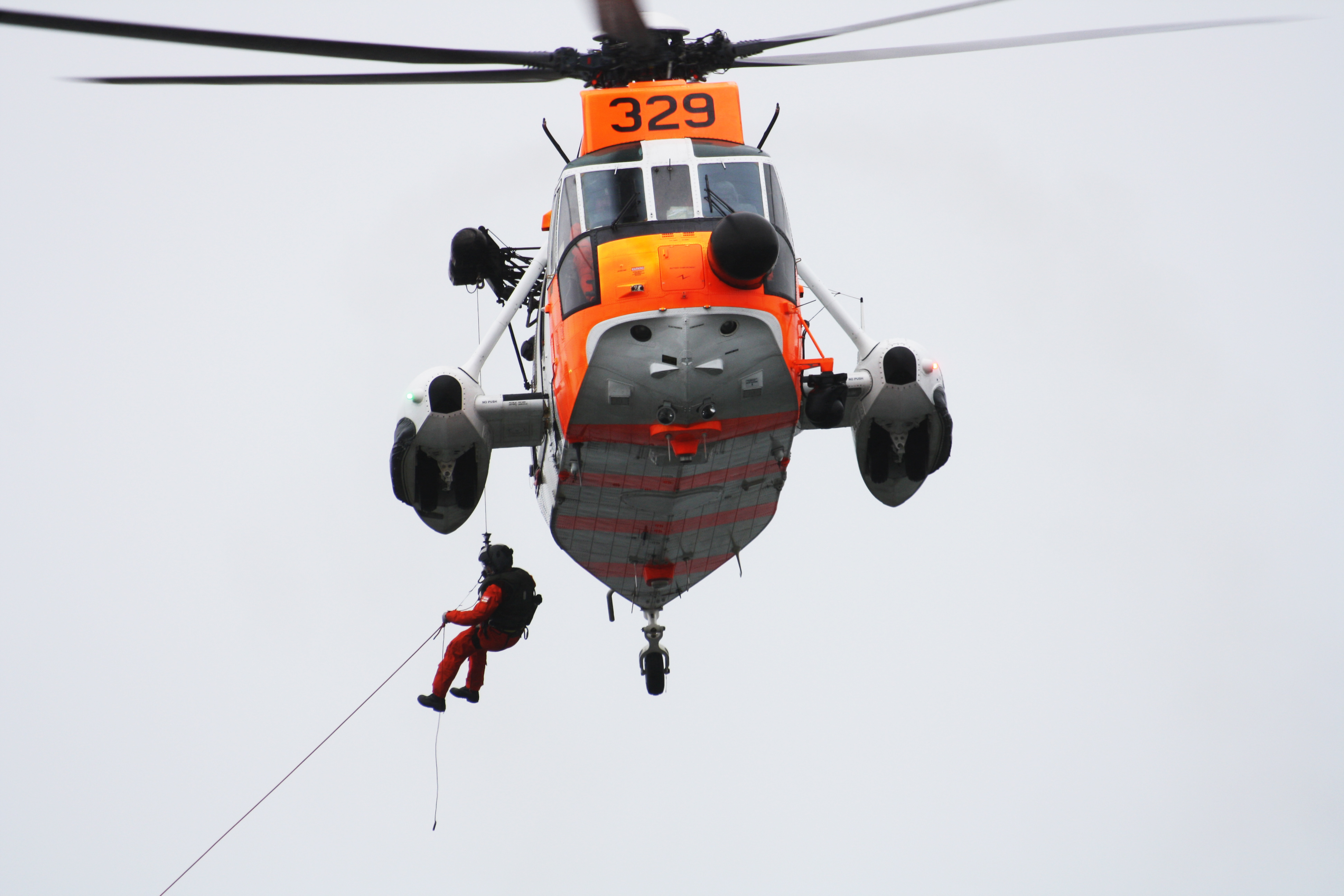 Redningshelikopteret Sea King